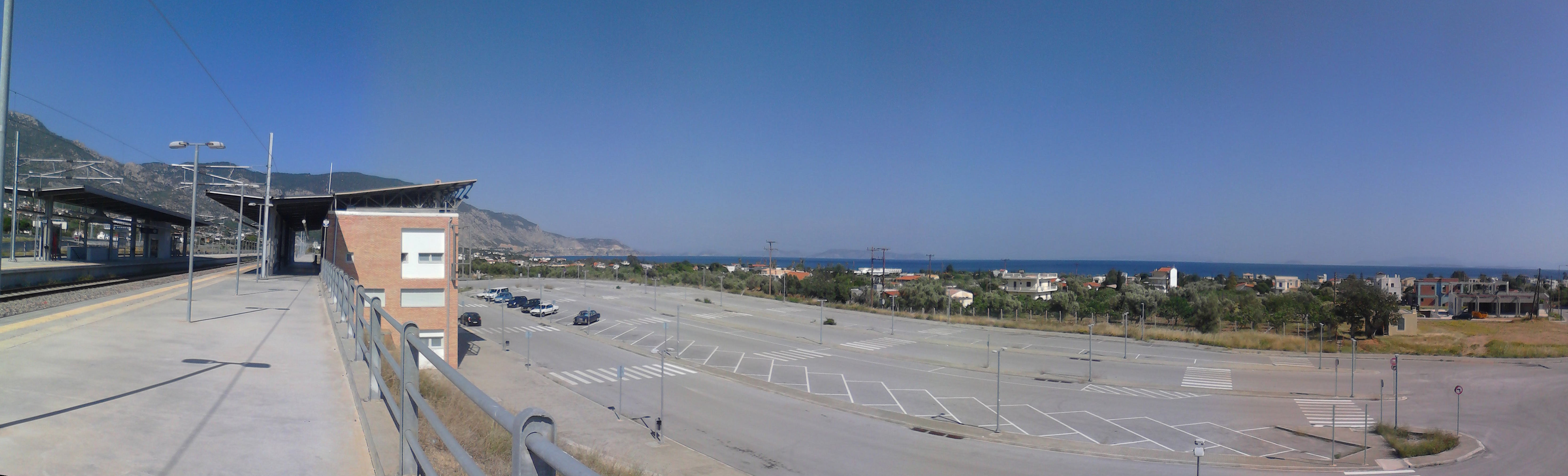 Σταθμός προαστιακού και πάρκινγκ